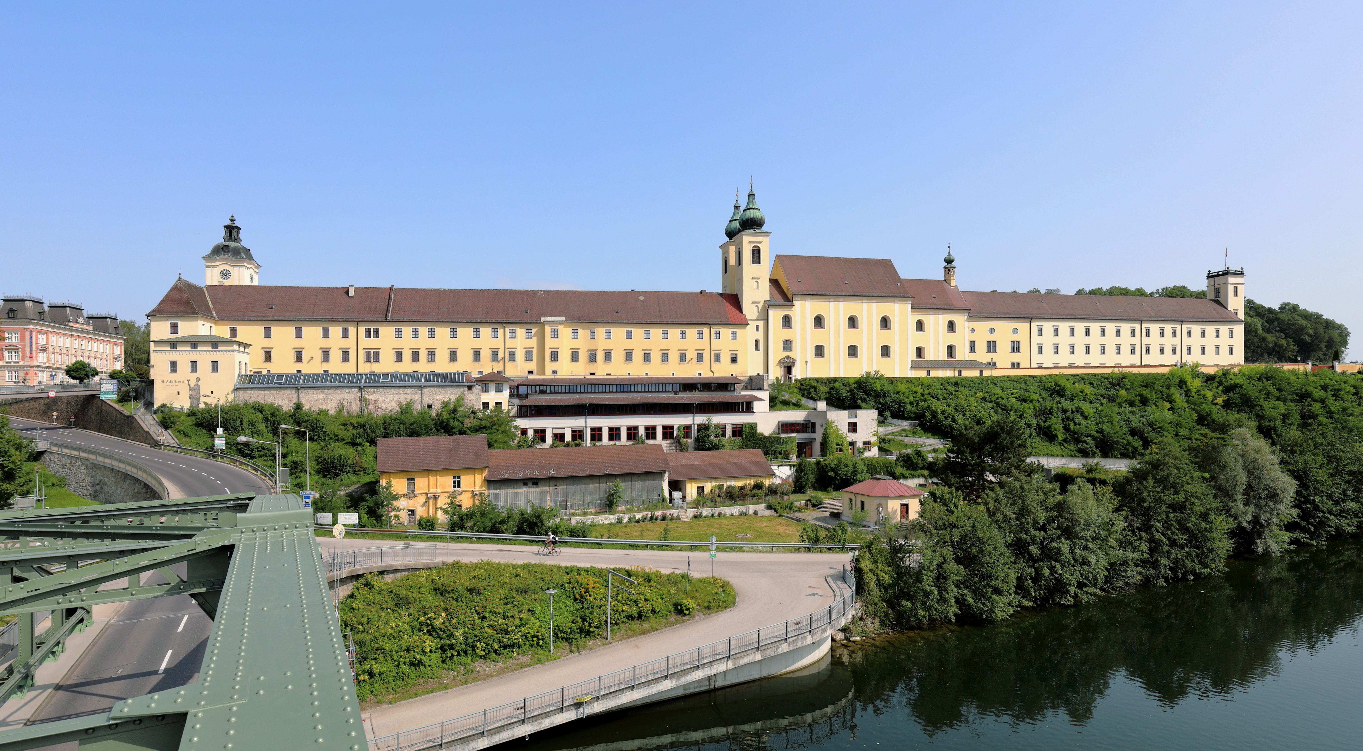 Südwestansicht des Benediktinerstiftes in der oberösterreichischen Marktgemeinde Lambach.Die stattliche langgestreckte Anlage auf einer Bodenwelle neben der Traun hat ihr heutiges Erscheinungsbild weitgehend durch die Bautätigkeit zwischen Mitte des 17. Jahrhunderts und Anfang des 18. Jahrhunderts erhalten. Gegründet wurde das Stift 1046 für weltliche Chorherren und 1056 als Benediktinerabtei. Beim Bayerneinfall 1233 wurde Kloster und Kirche Großteils zerstört.